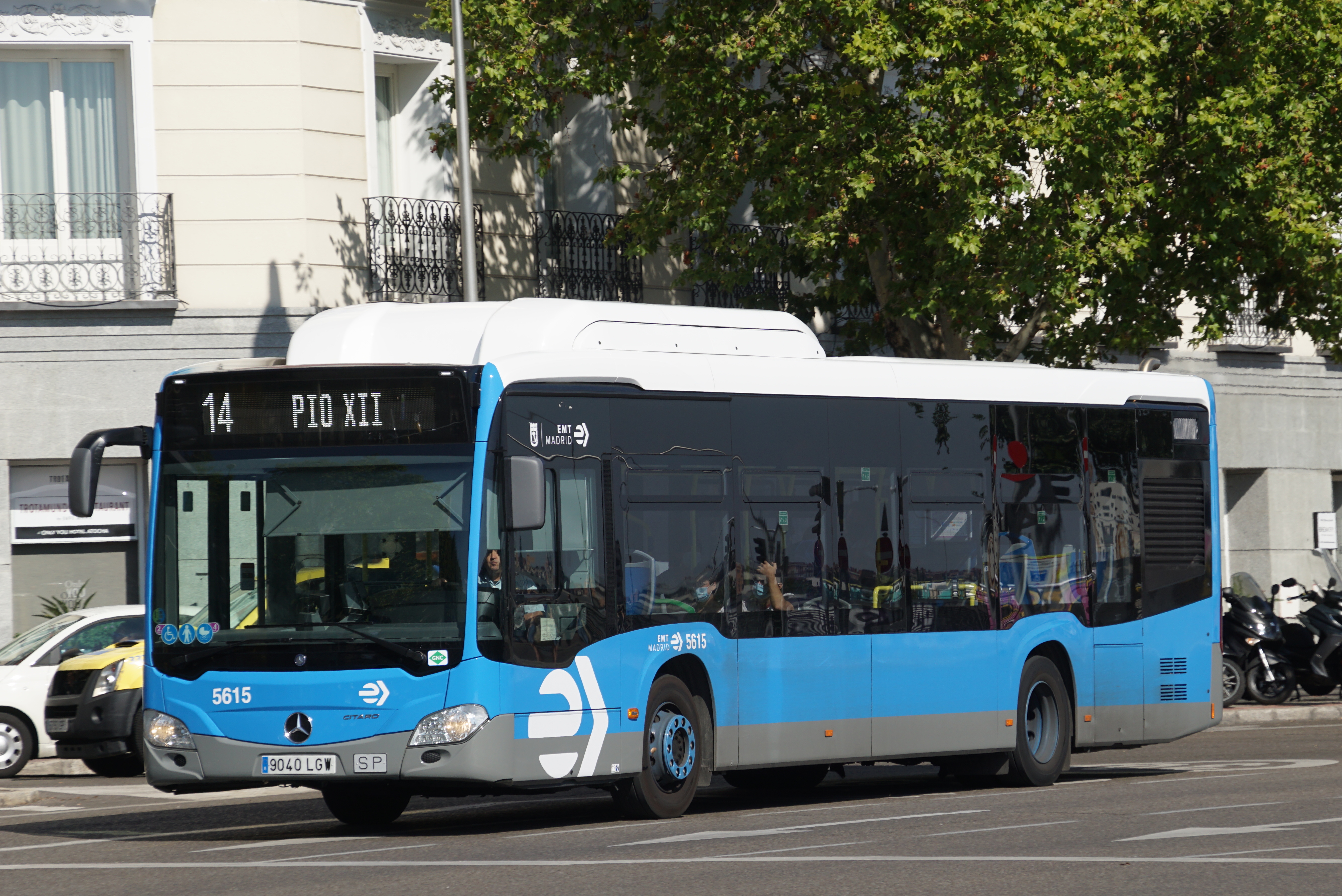 14 EMT Madrid junto a la estación de Atocha, agosto 2020